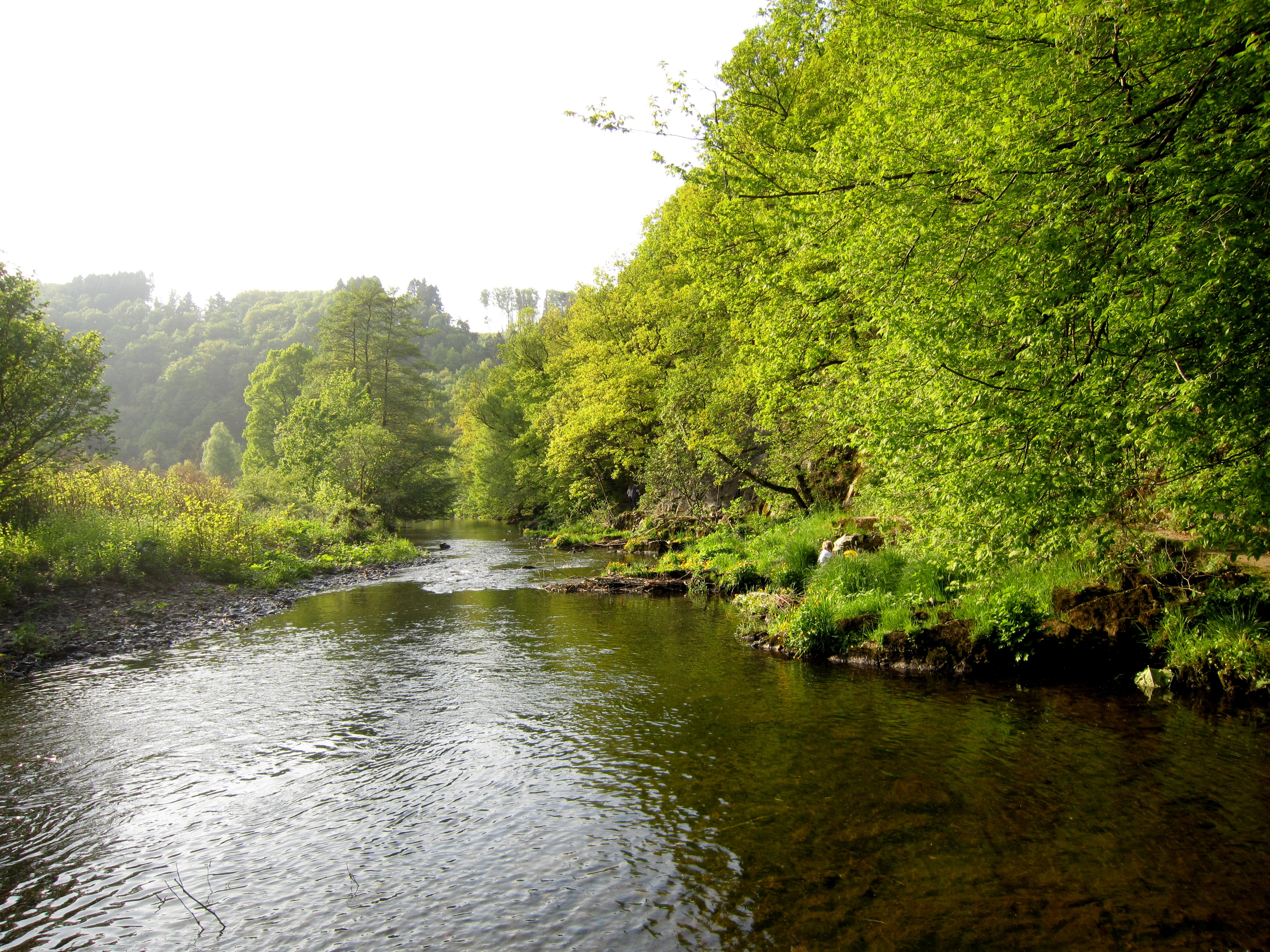 Wupper zwischen Wuppertal (links) und Ennepetal (rechts)